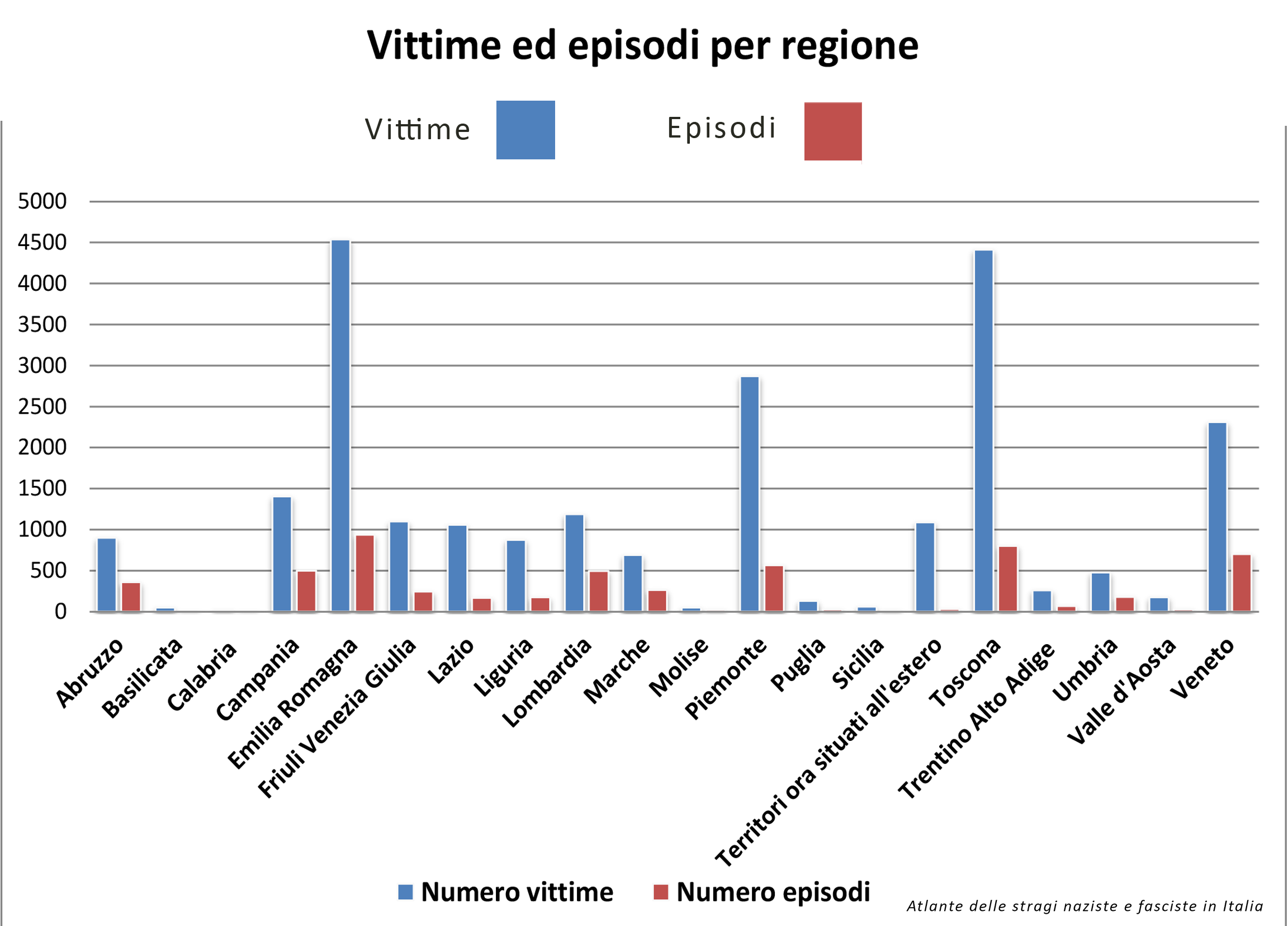 Grafico a istogramma delle vittime e di episodi per regione delle stragi naziste e fasciste su territorio italiano dal 1943 al 1945.